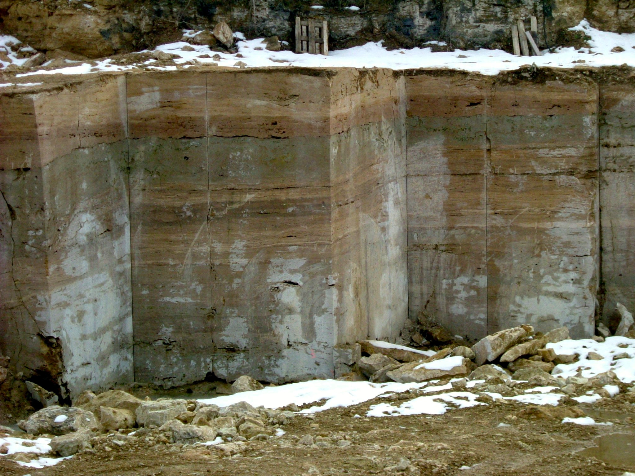 Nationaler Geotop: Travertine des Ilmtales ; Travertin von Ehringsdorf